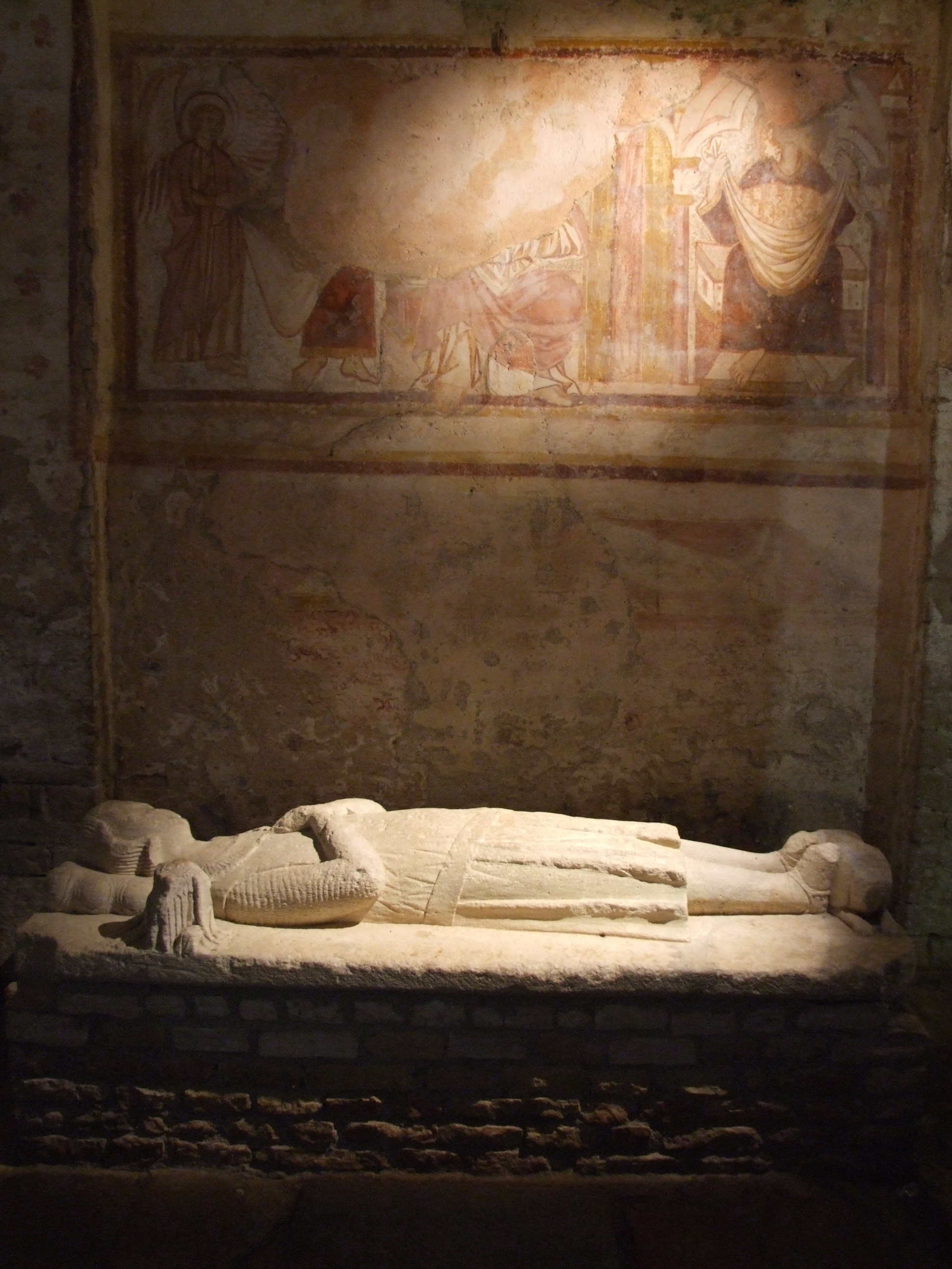 Église Saint-Pierre, Brancion, Saône-et-Loire, Bourgogne, FRANCE